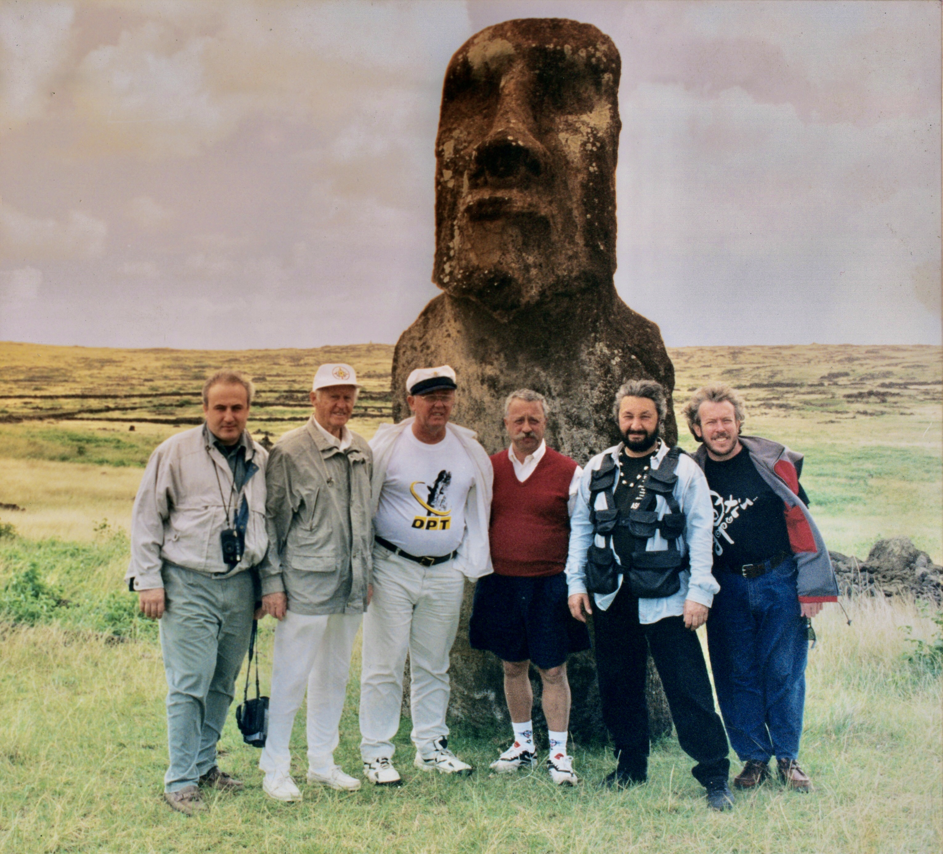 на острове Пасхи